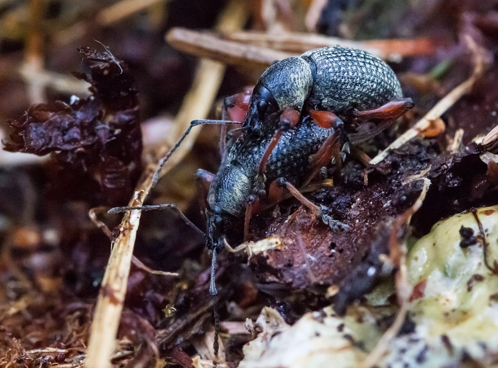 Kärnten, Tauerntal 1500 m ü.M. bei Mallnitz unterm Moos: Schwarzer Fichten-Dickmaulrüßler, Rotbein (Harde/Severa, Aufl. 2006, S. 302/6)